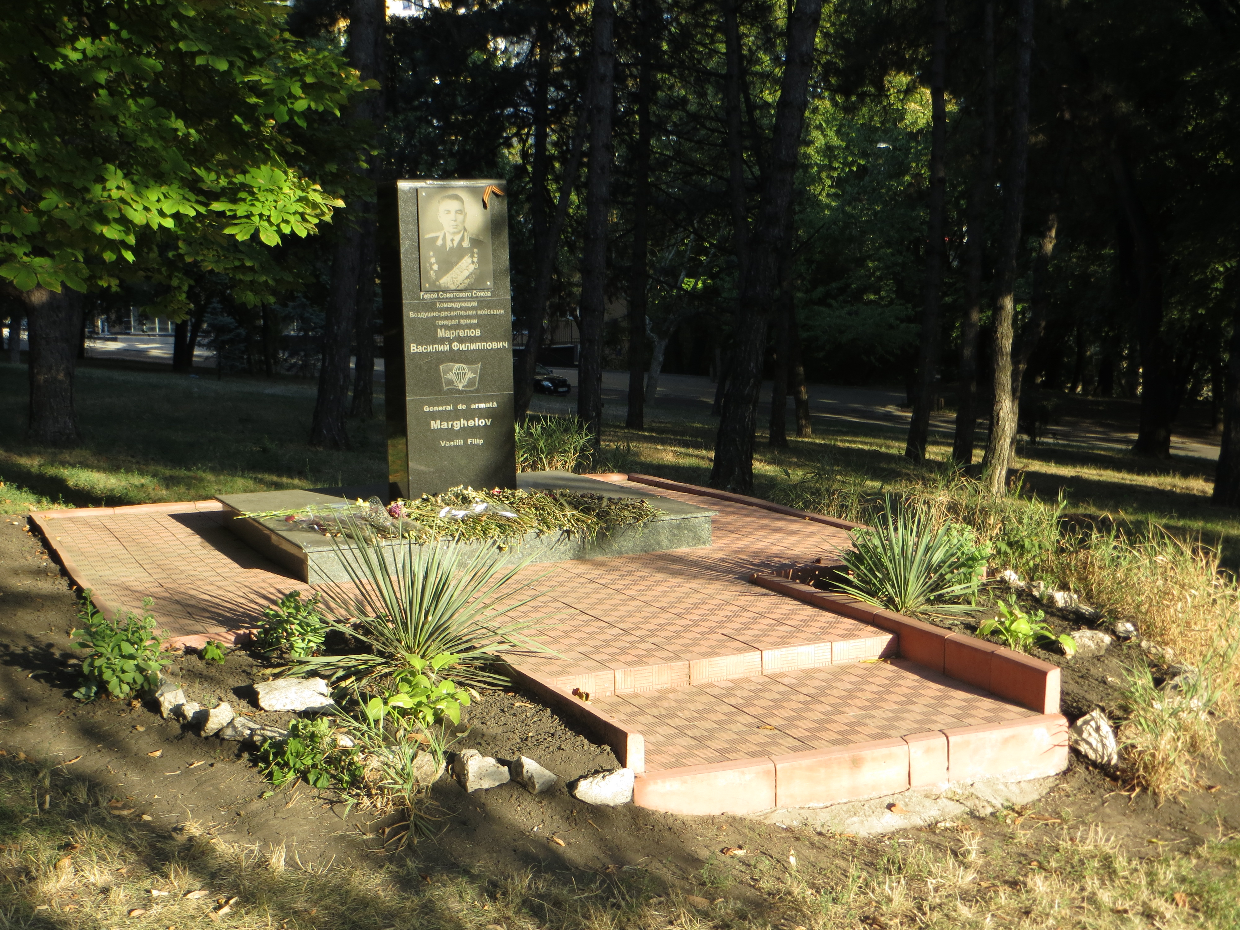 Памятник Маргелову В.Ф. в Кишиневе